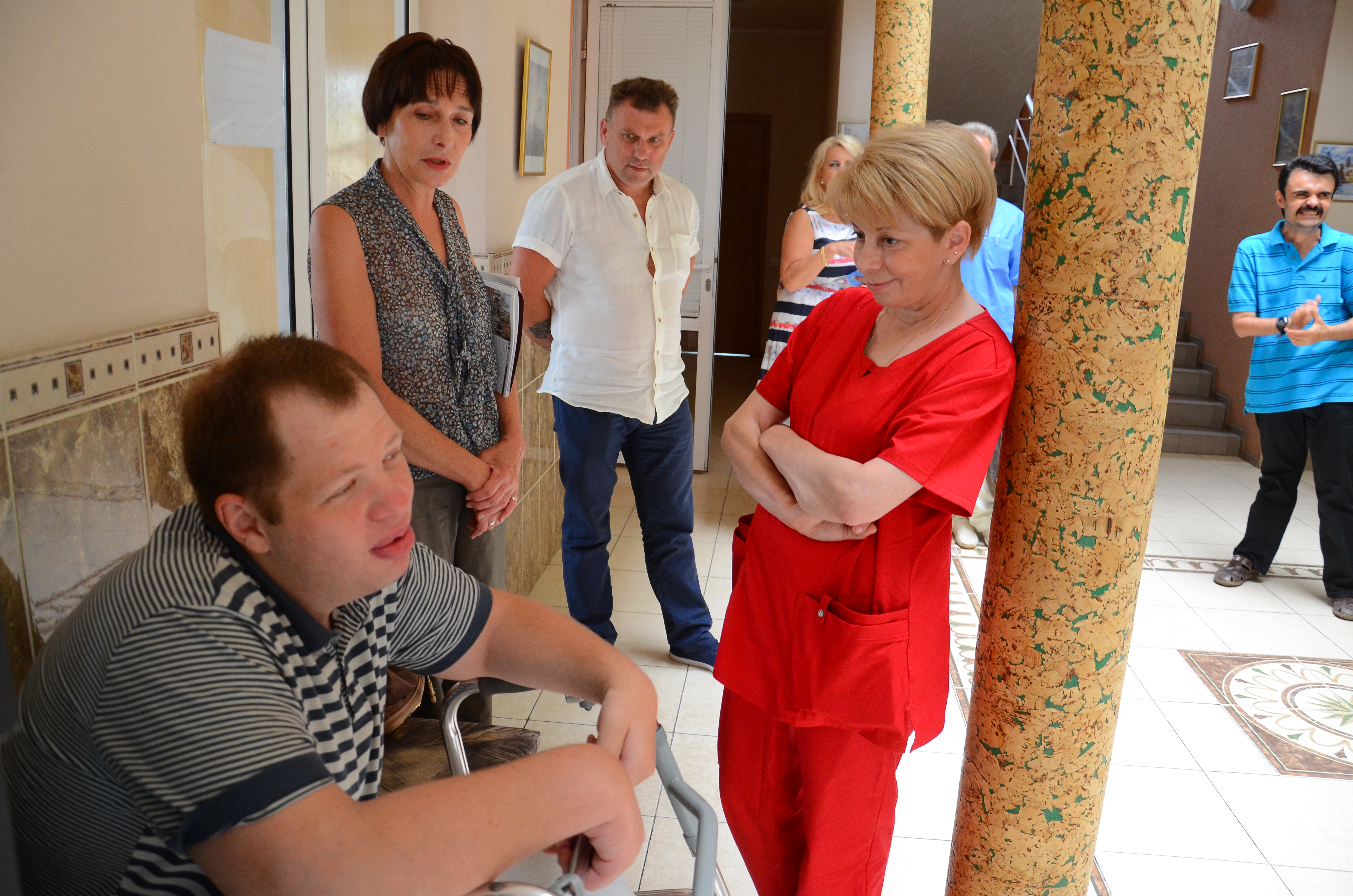 Глинка Елизавета Петровна в ДГБФ «Доброта»